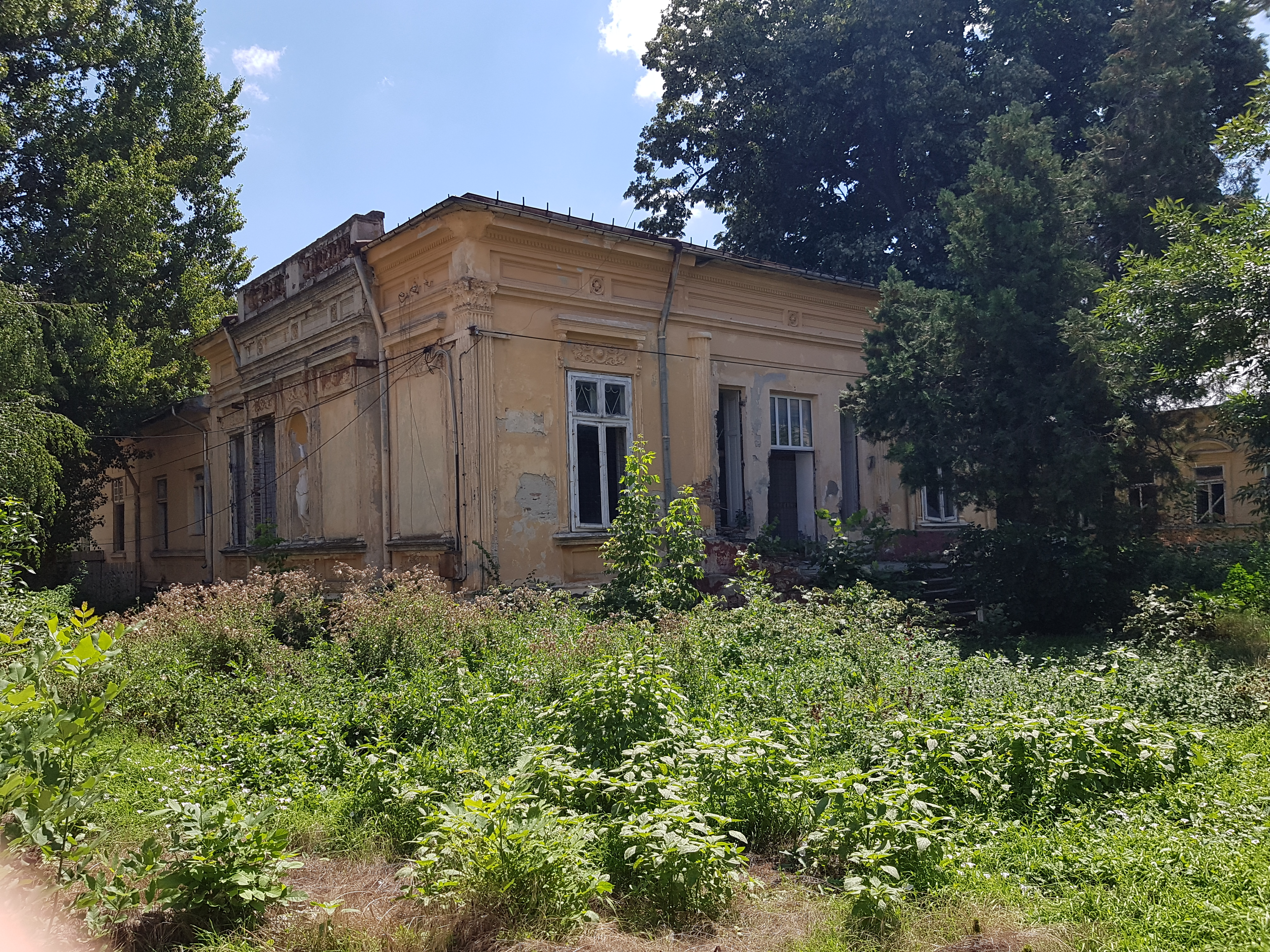 Casa Macridescu